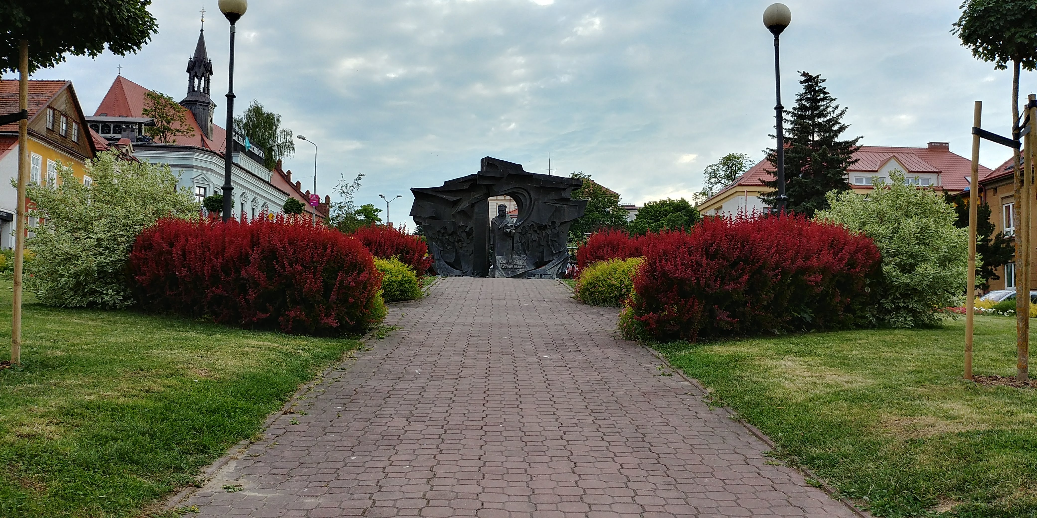 Plac gen. Leopolda Okulickiego w Bochni.